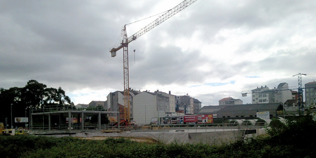 Colector EDAR Cabo Prioriño na Gándara, Narón